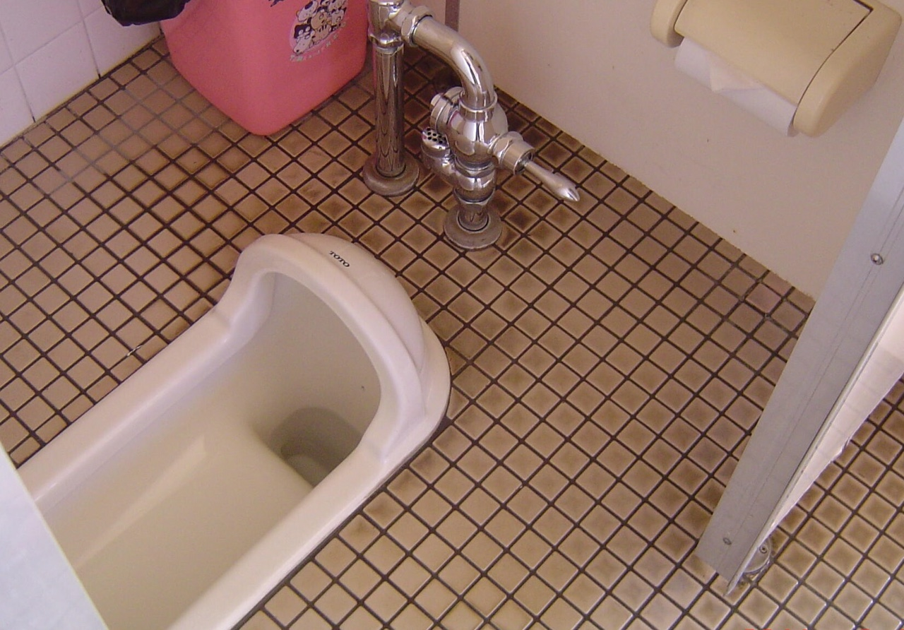 低圧型フラッシュバルブ